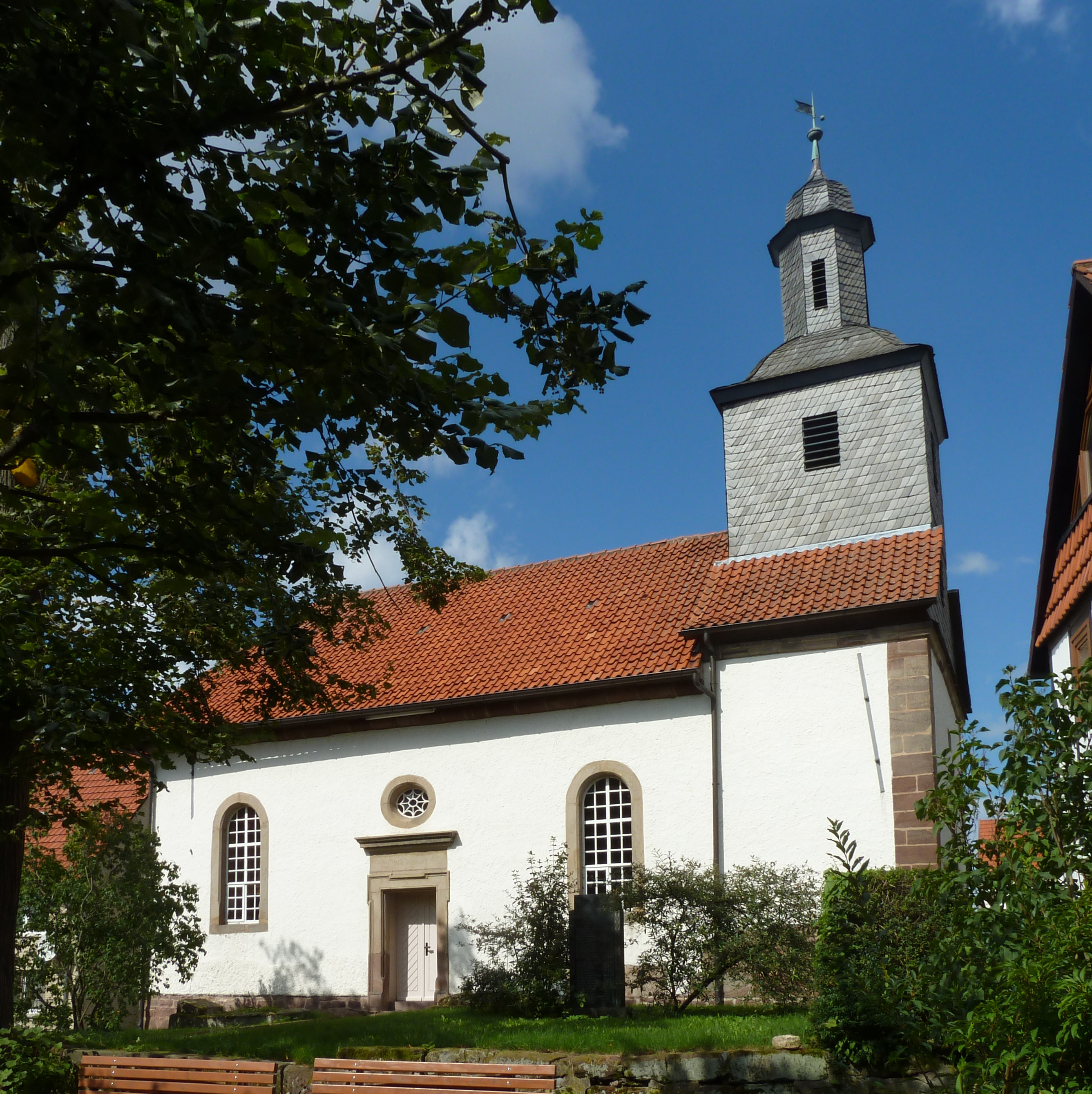 Ev.-ref. Kirche in Mackenrode, Gemeinde Landolfshausen, Niedersachsen. umfassender Umbau dat. 1735